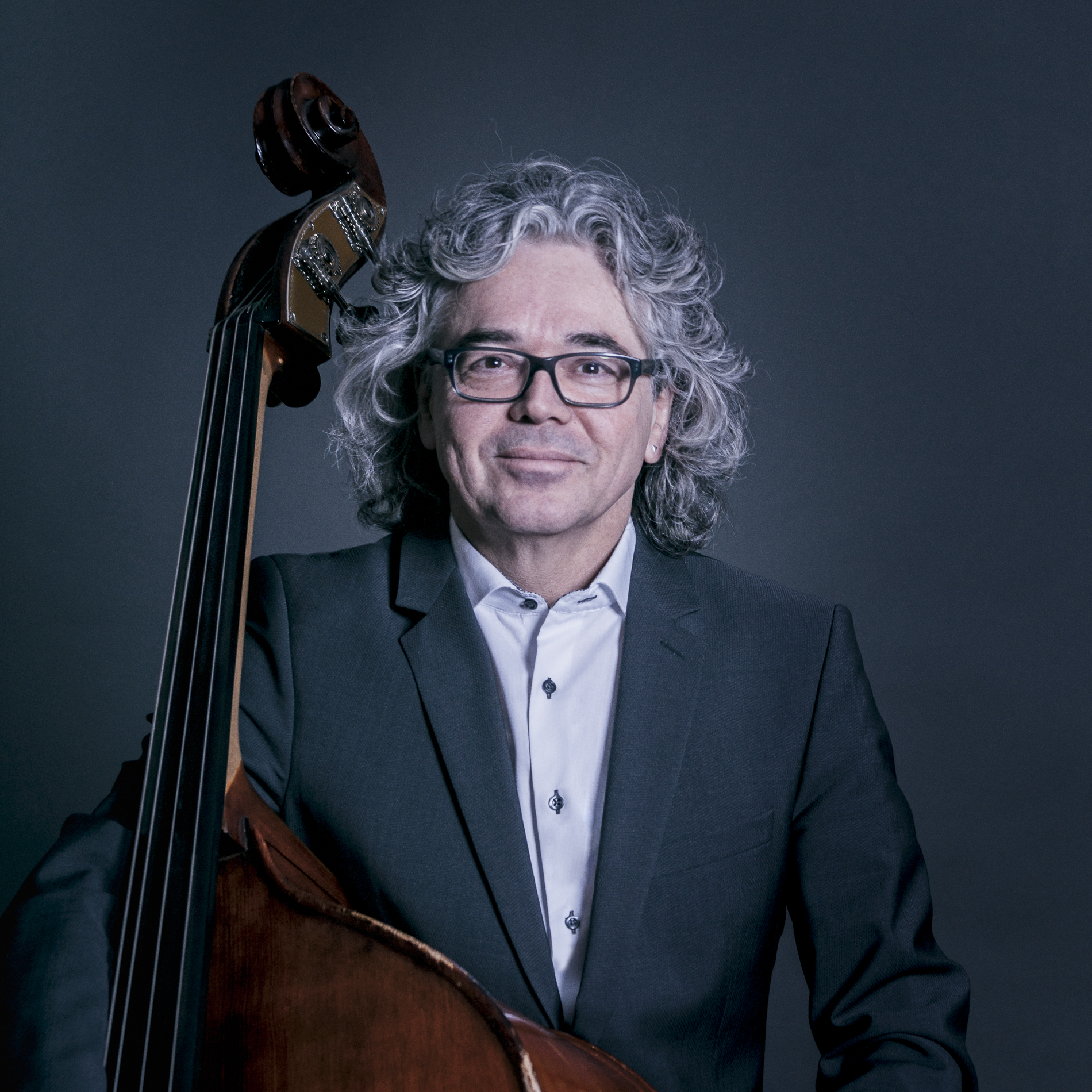 Markus Fritsch